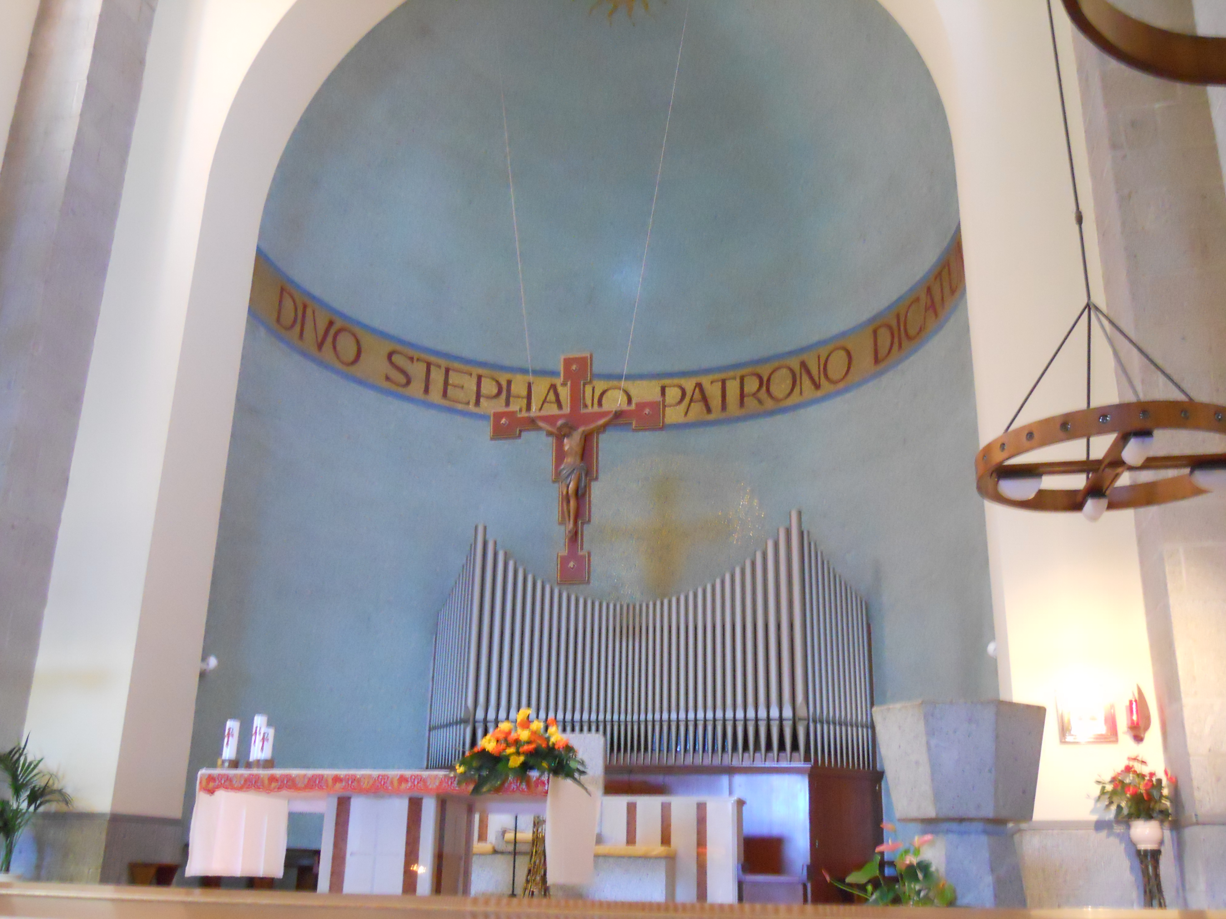 Il presbiterio (2006) e l'organo della Ditta Mascioni (1963) della chiesa arcipretale di Santo Stefano Protomartire a Porto Santo Stefano, in provincia di Grosseto.